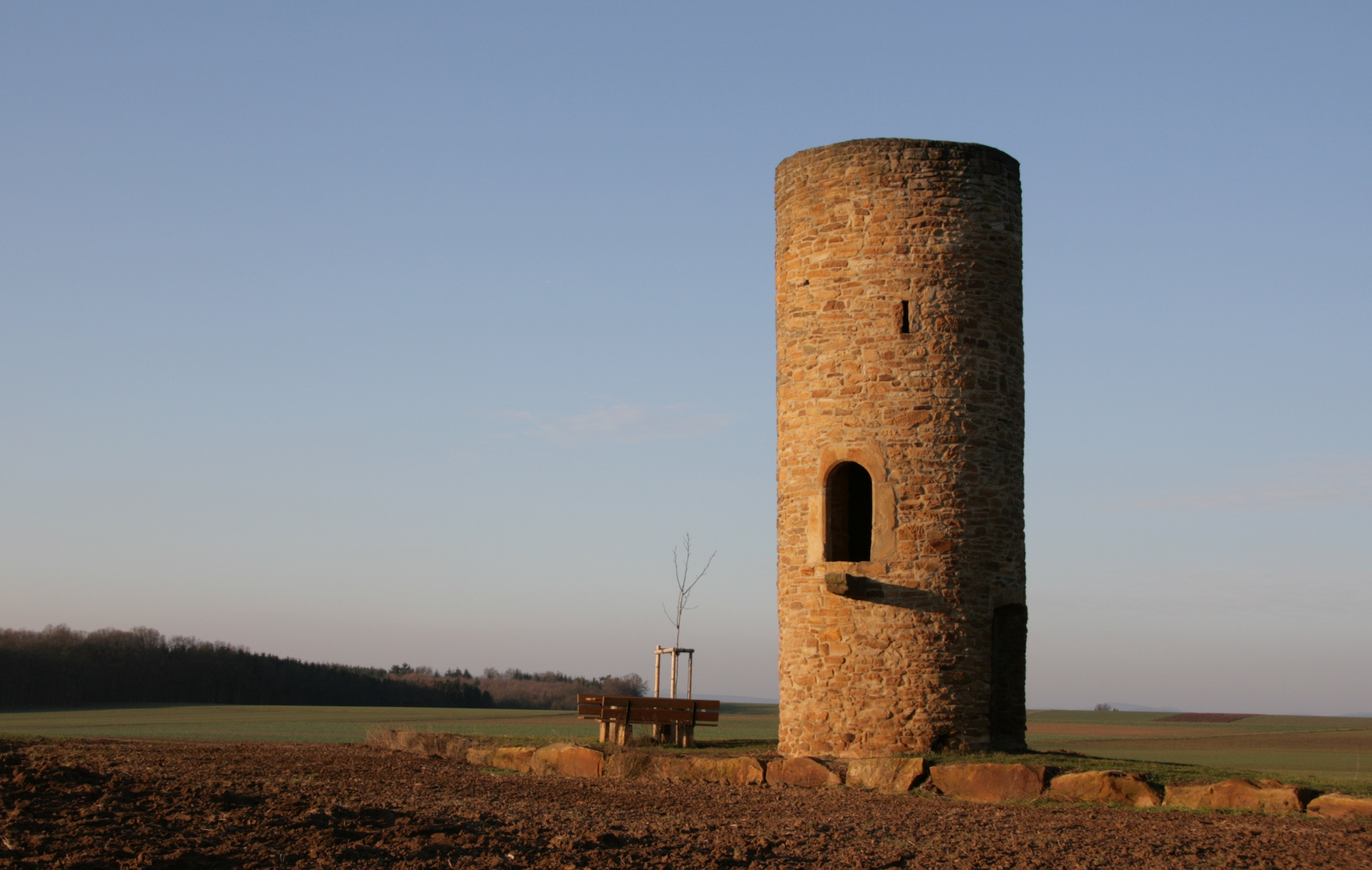 Weißer Turm in der Wintersonne in Wülfershausen an der Saale